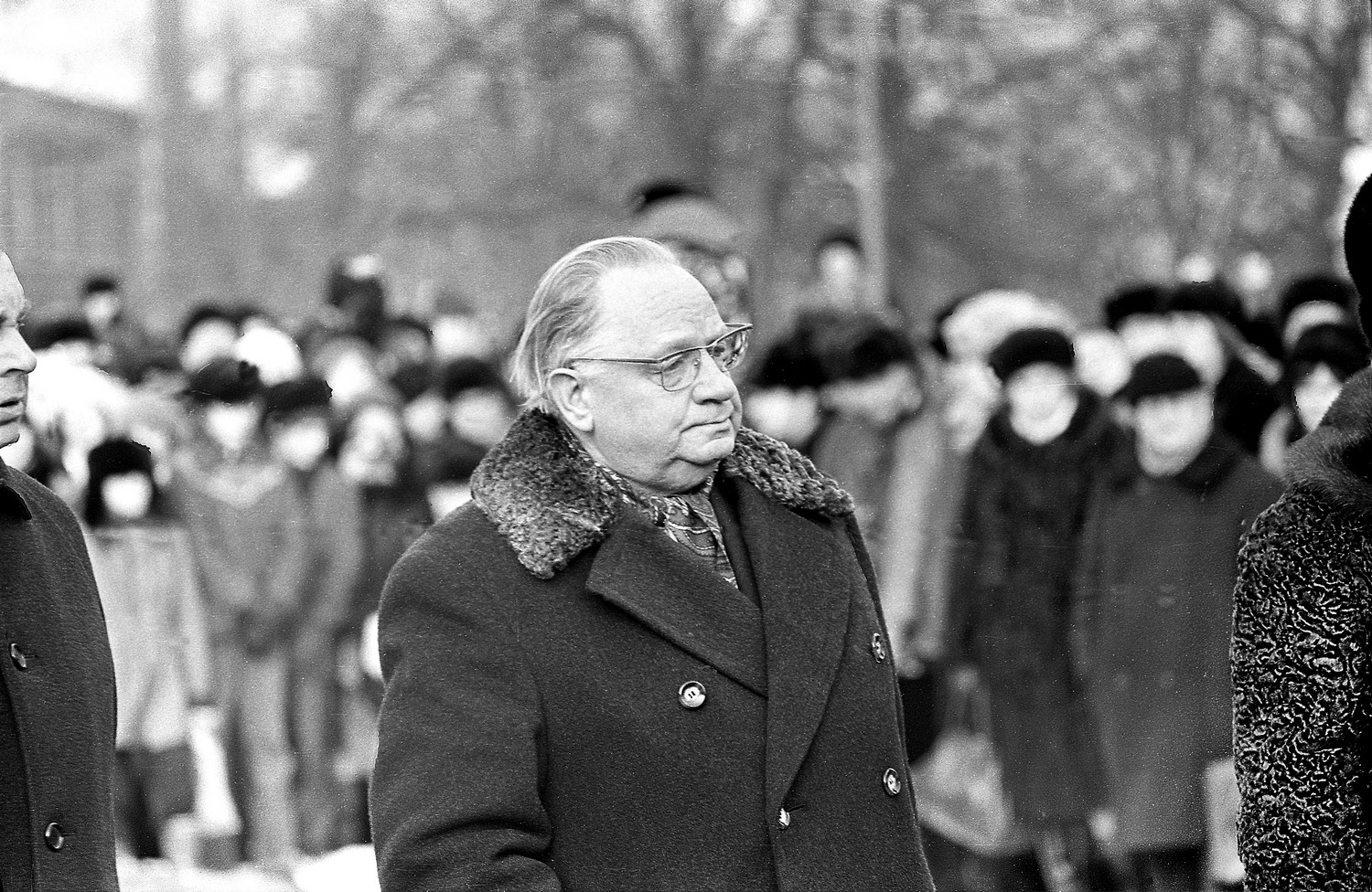 A. H. Tammsaare monumendi avamine 78 (16) Johannes Käbin